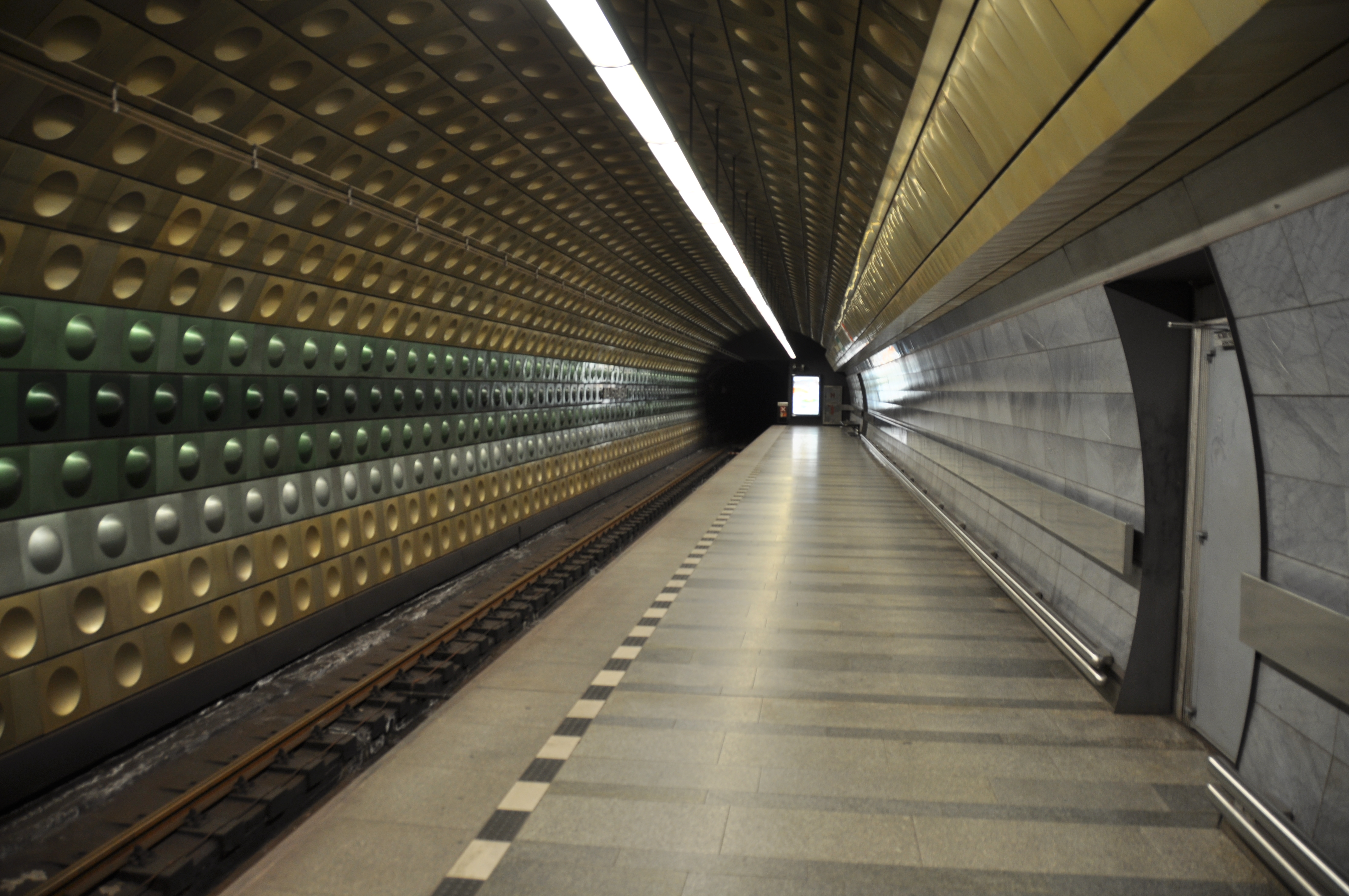 Metro Praha